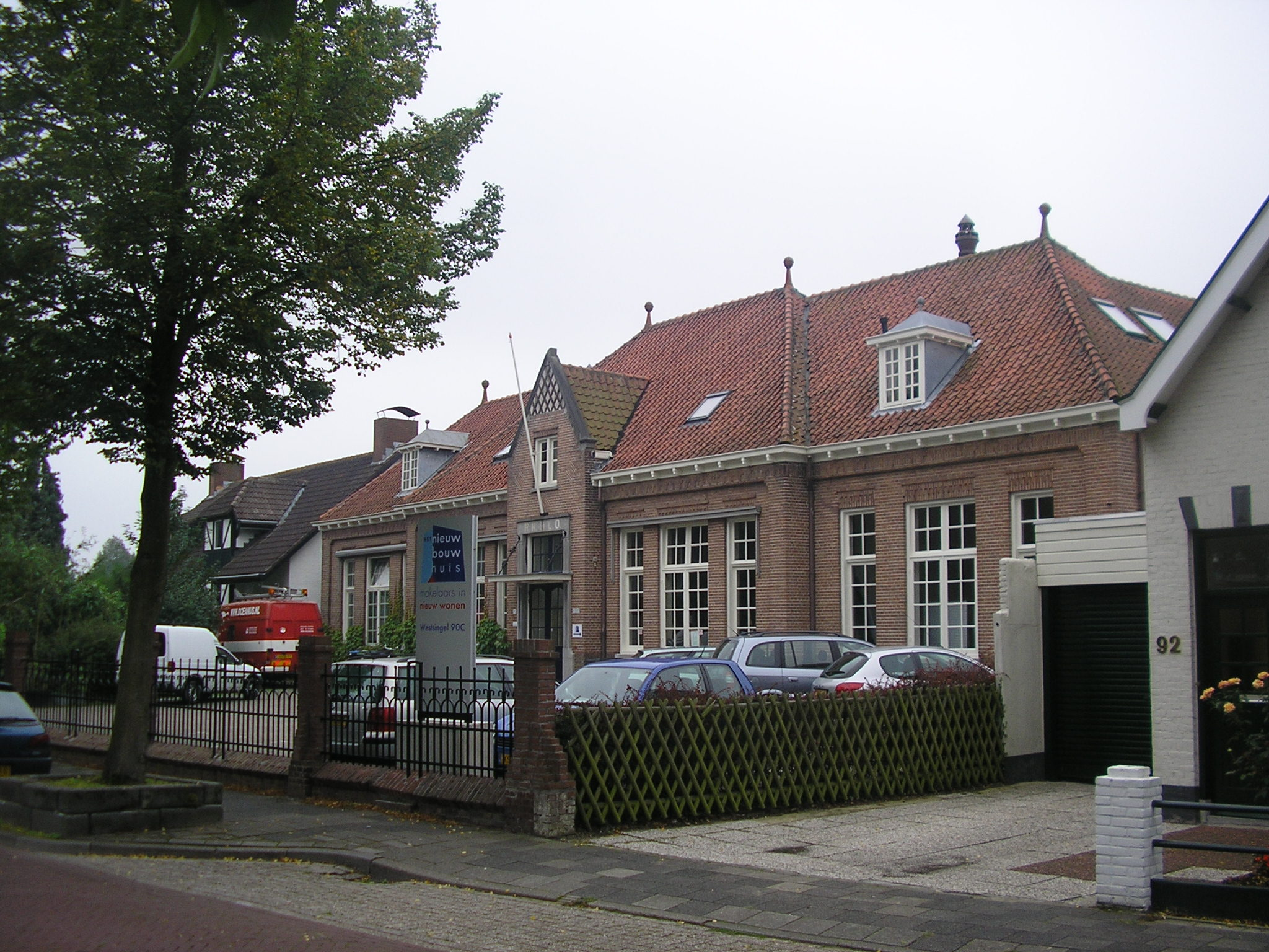 Voormalig R.K. ULO nu makelaarskantoor.